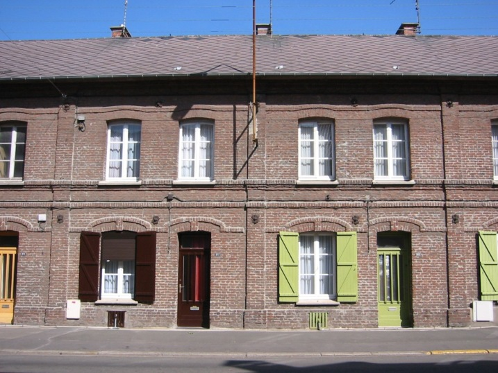 Maisons de miniers (Hénin-Beaumont)